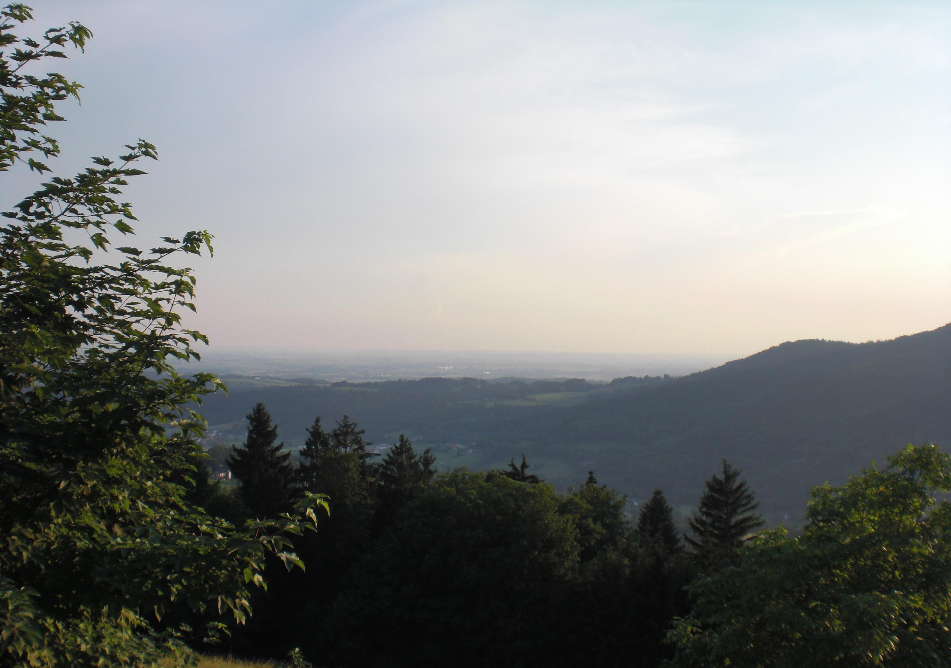 Blick von Grafling/Arzting in die Donauebene nach Südwesten